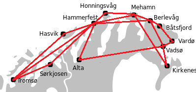 Rutekart Hammerfest